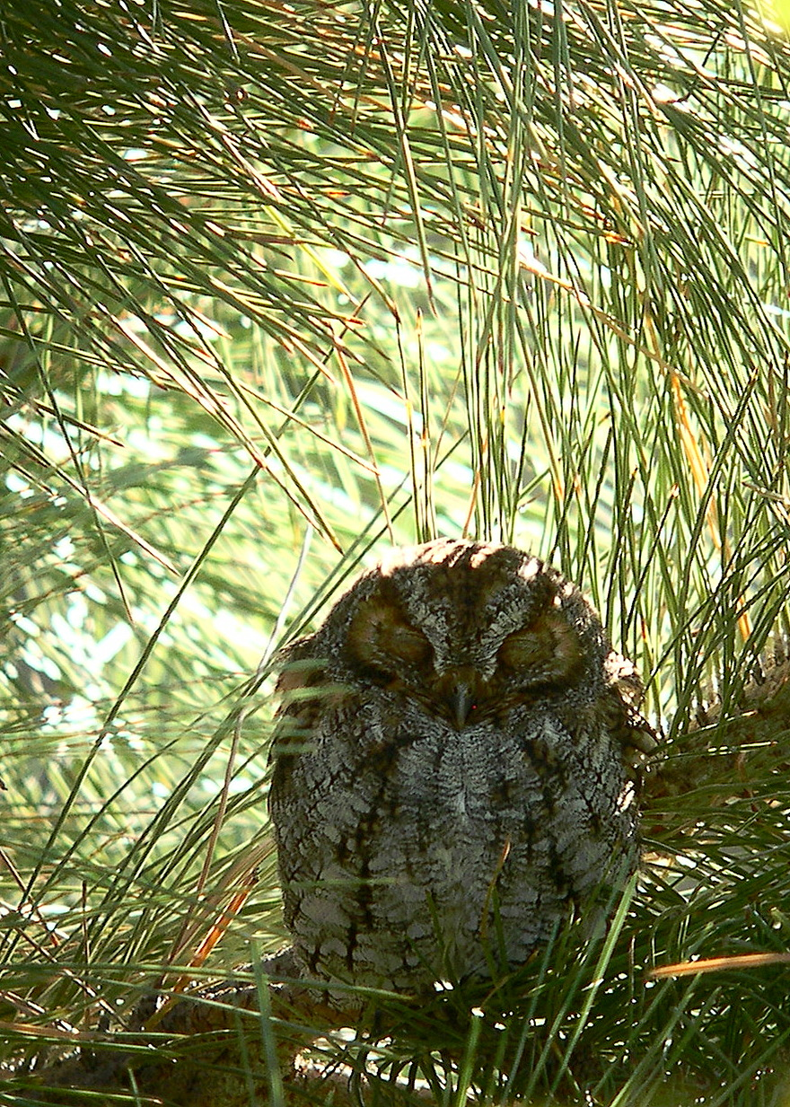 Psiloscops flammeolus, Reno, Nevada; ebird checklist